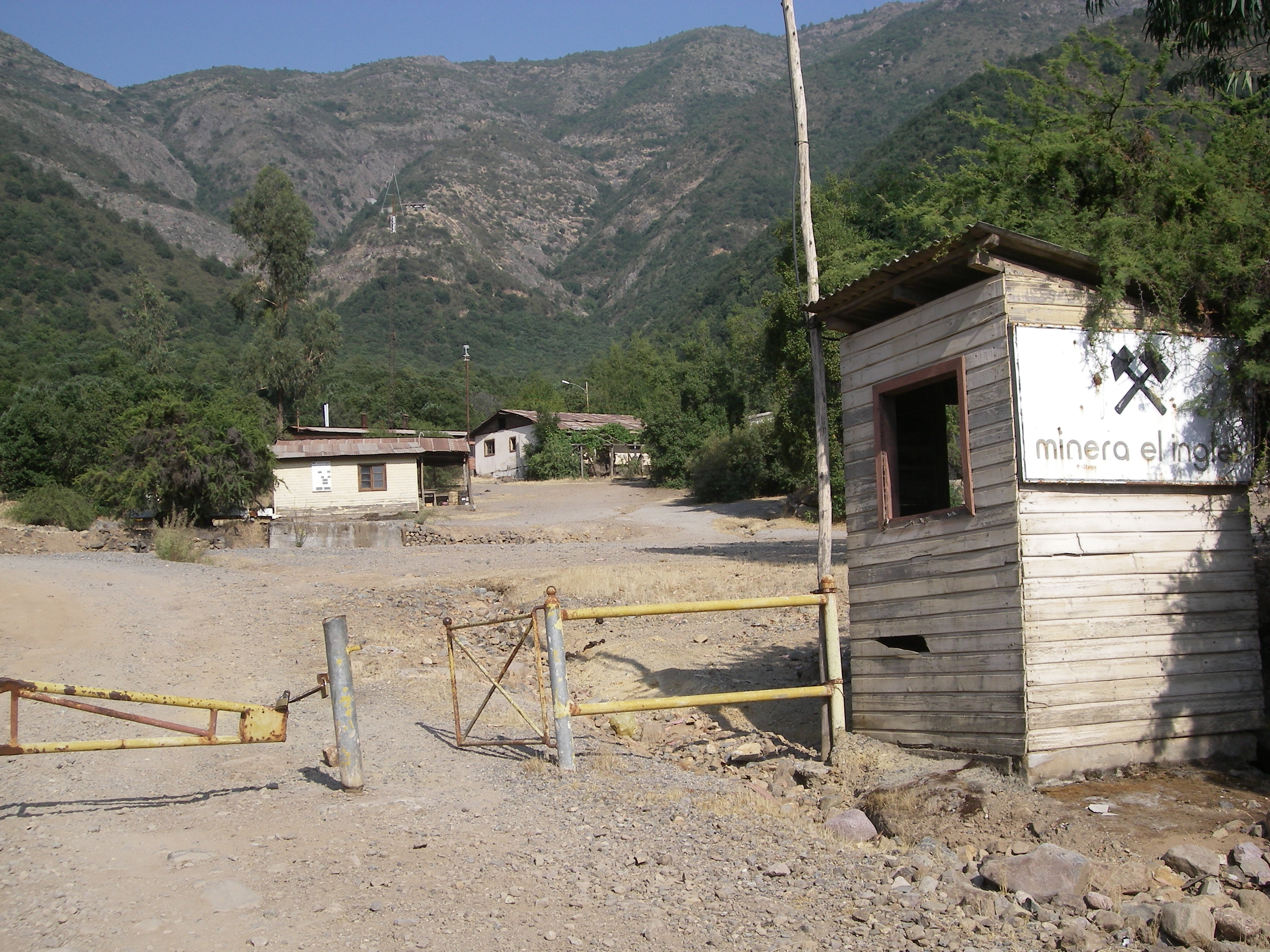 Chancón, Mina El Inglés.